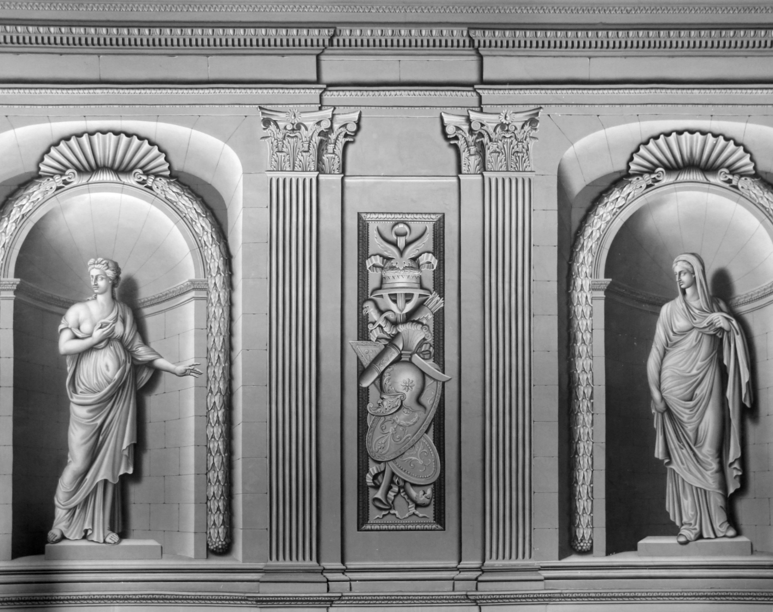 Grisaillemalerei in der Galerie des Schlosses Tanlay